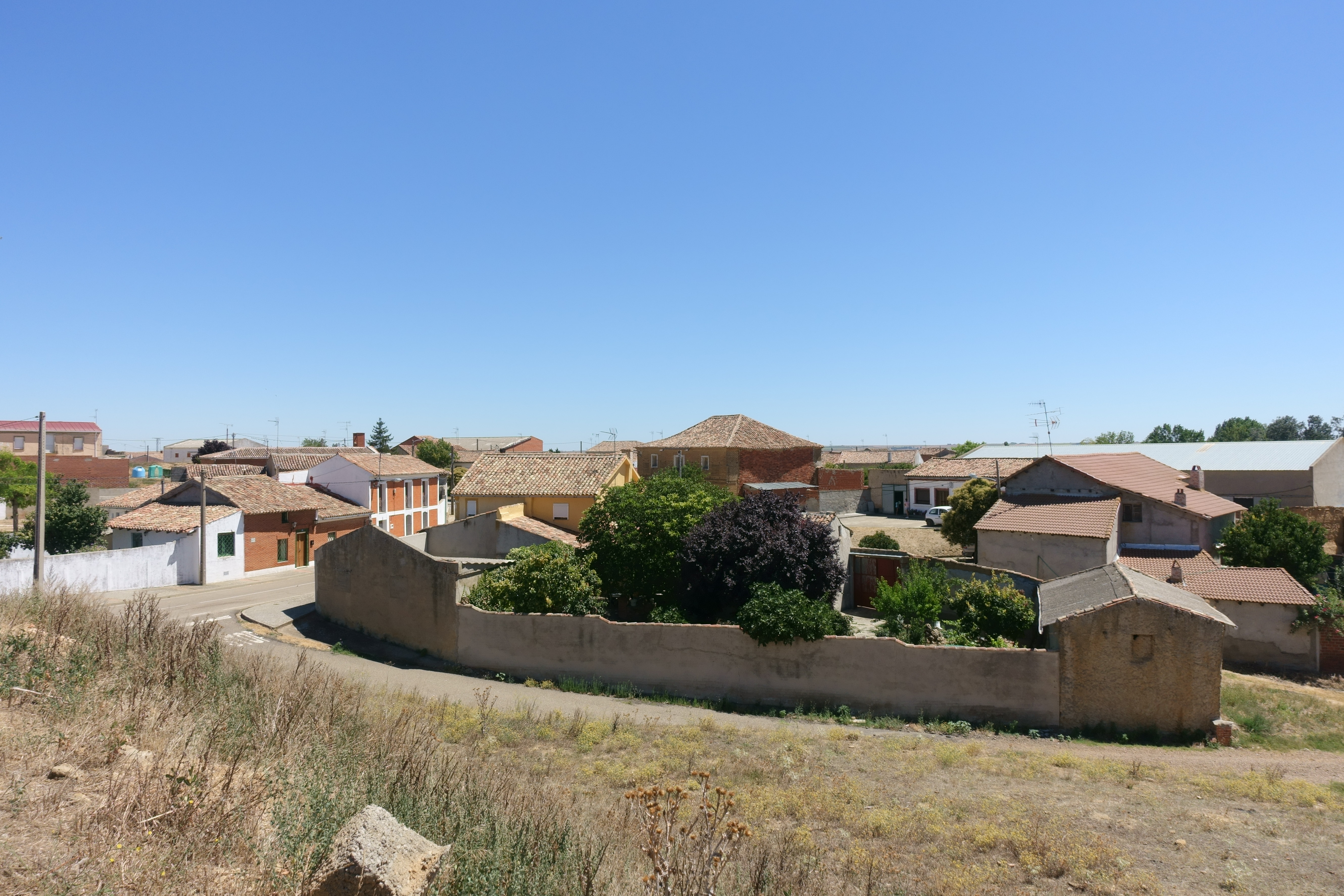 Vista parcial de Villalba de la Loma (Valladolid, España).